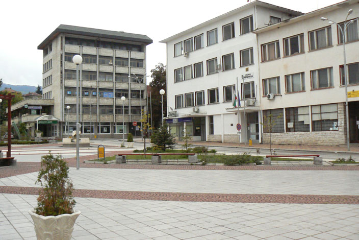 Centre of Yablanica (Yablanitza), Bulgaria. Центърът на Ябланица, България